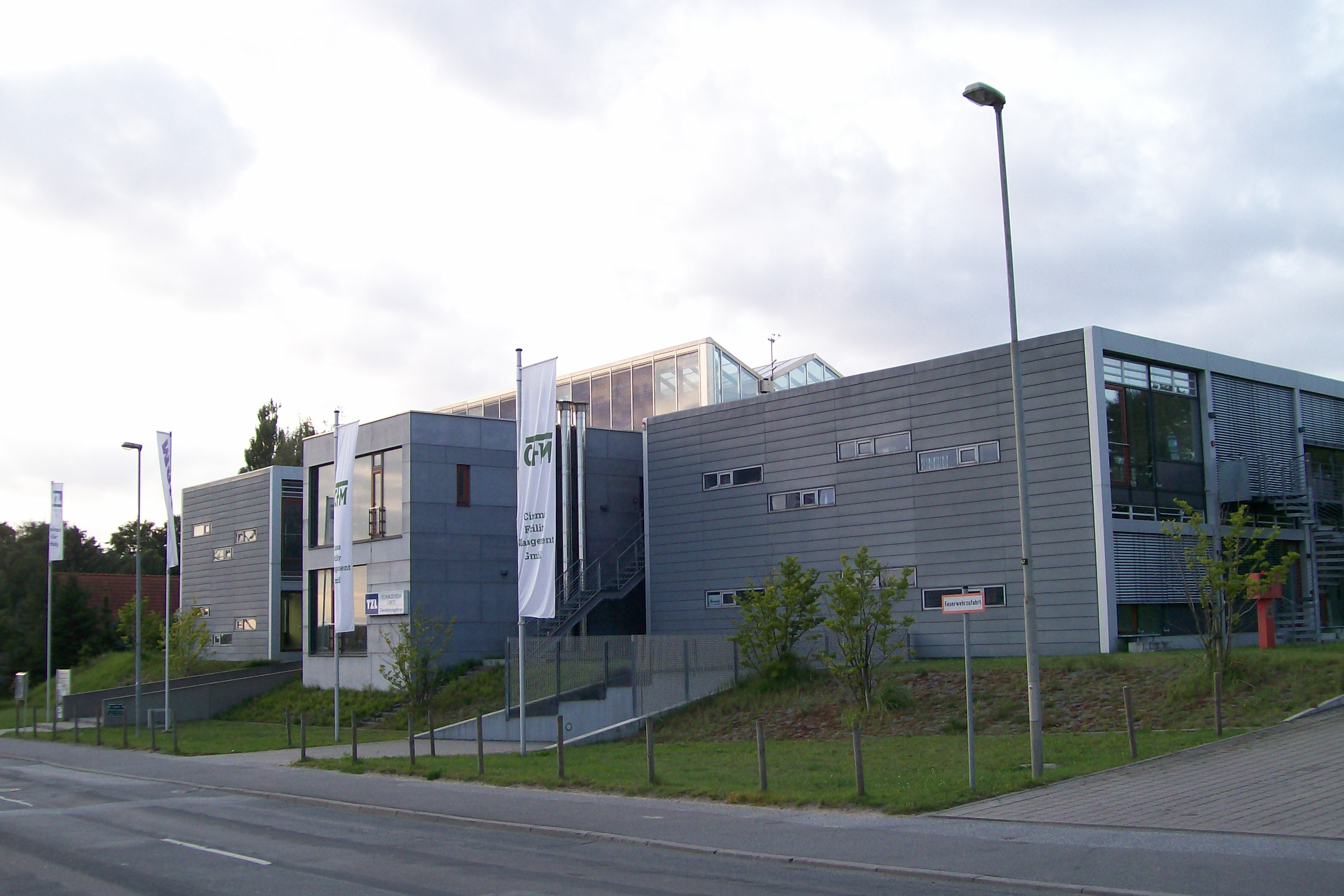 Dienstleistungszentrum des Technikzentrums Lübeck in Lübeck-Herrenwyk